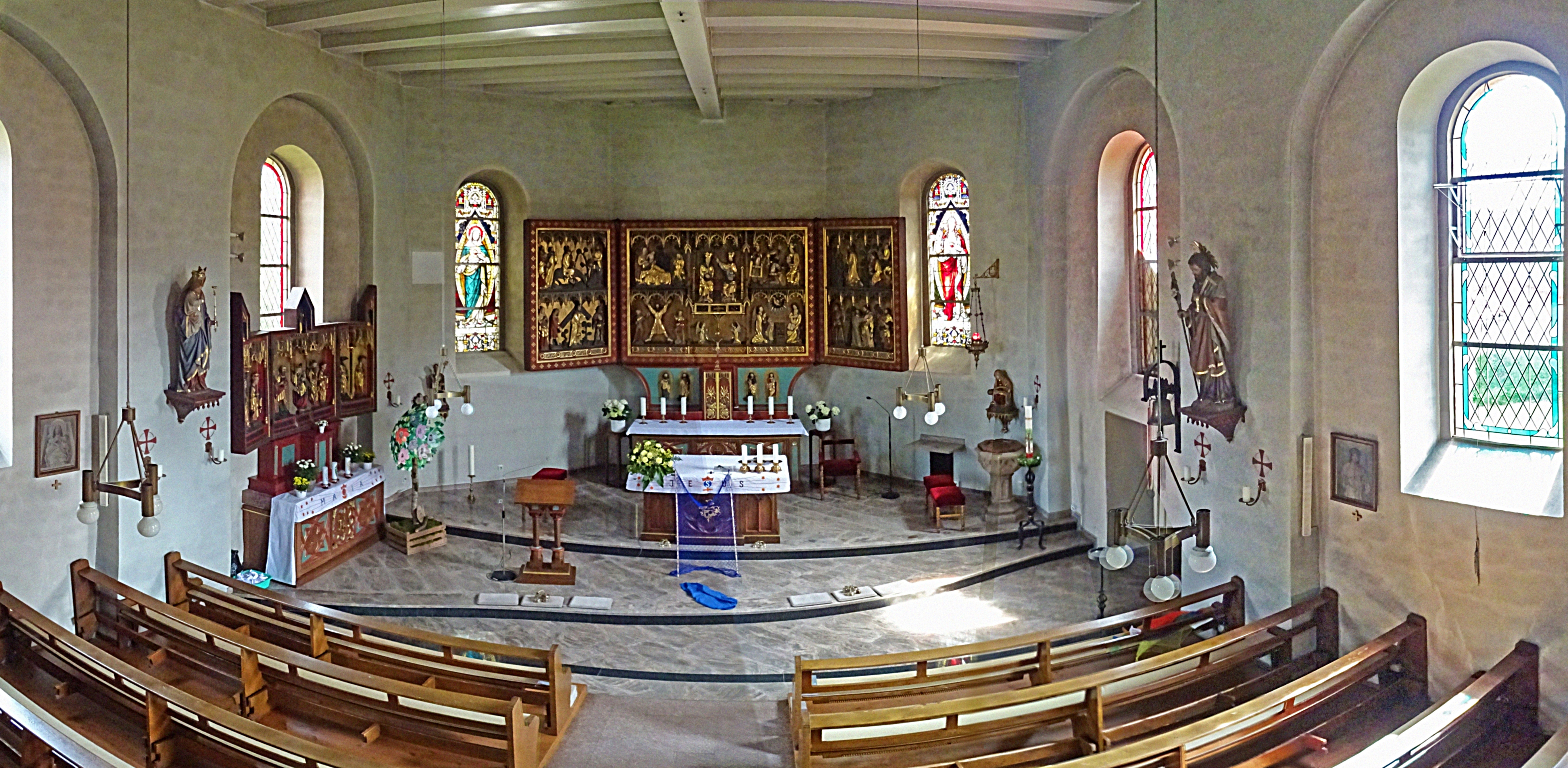 Innenraum Panorama der Nikolauskirche (Neuendorf)